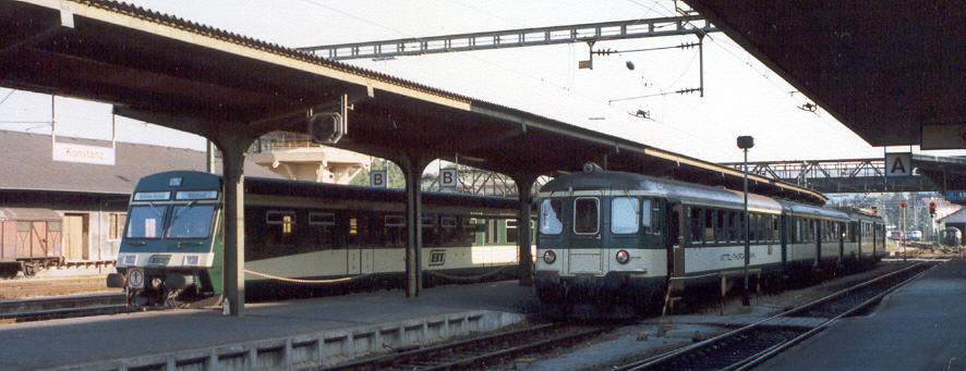 Personenzug mit Eidgenössischen Amt für Verkehr Triebwagen mit AB Leichtstahl und Bt in Konstanz neben einem Privatbahn Neuer Pendelzug der Bodensee-Toggenburg-Bahn, bestehend aus ABt-B-RBDe 4/4 als Direktzug von und nach Sankt Gallen.